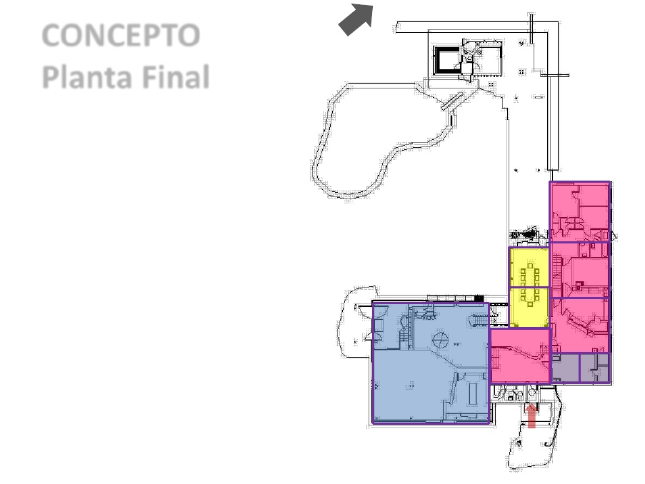 Distribucion Espacios Interiores